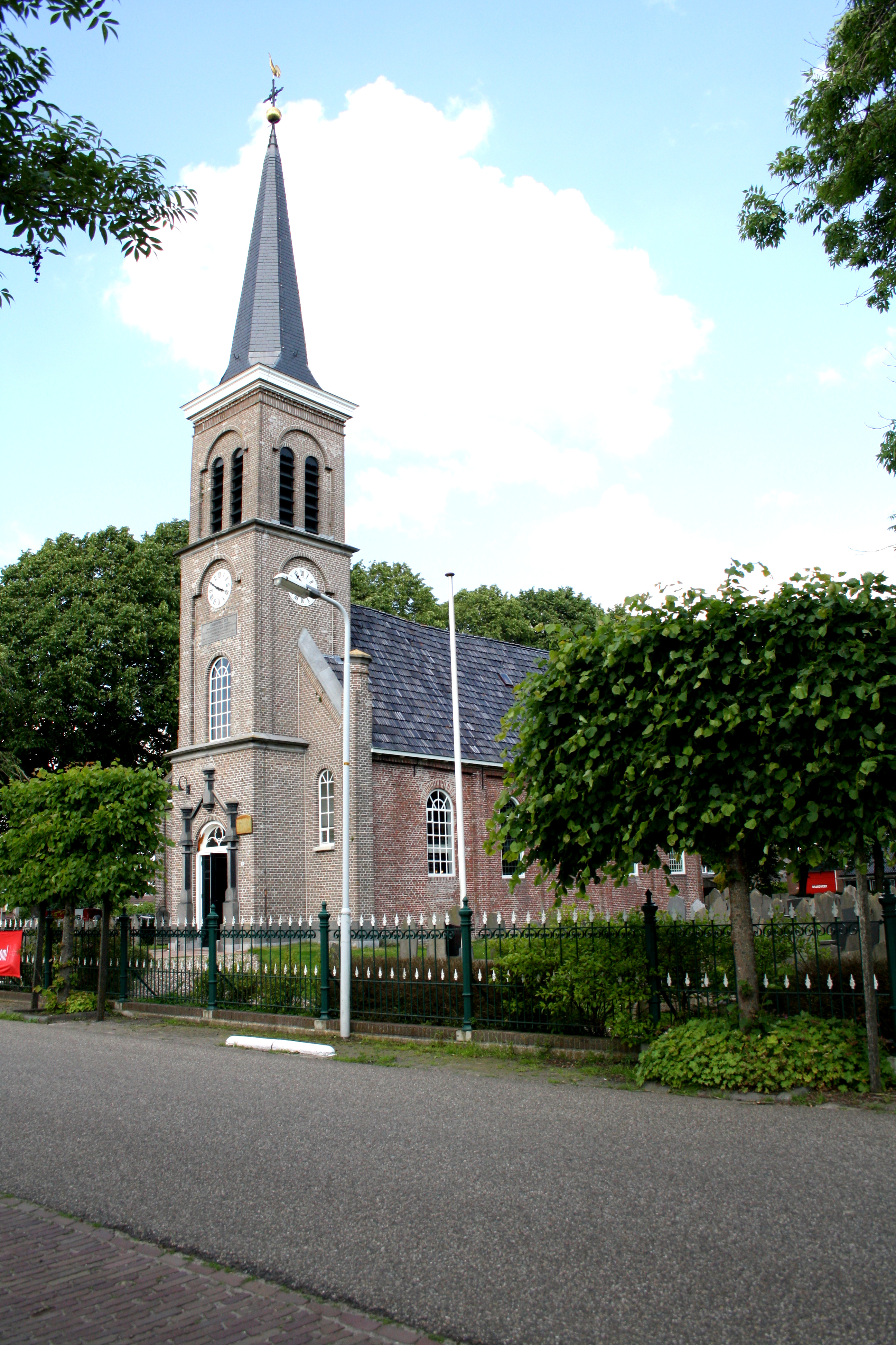 Scherpenzeel (Fr) - hervormde kerk - 1788 in gebruik genomen